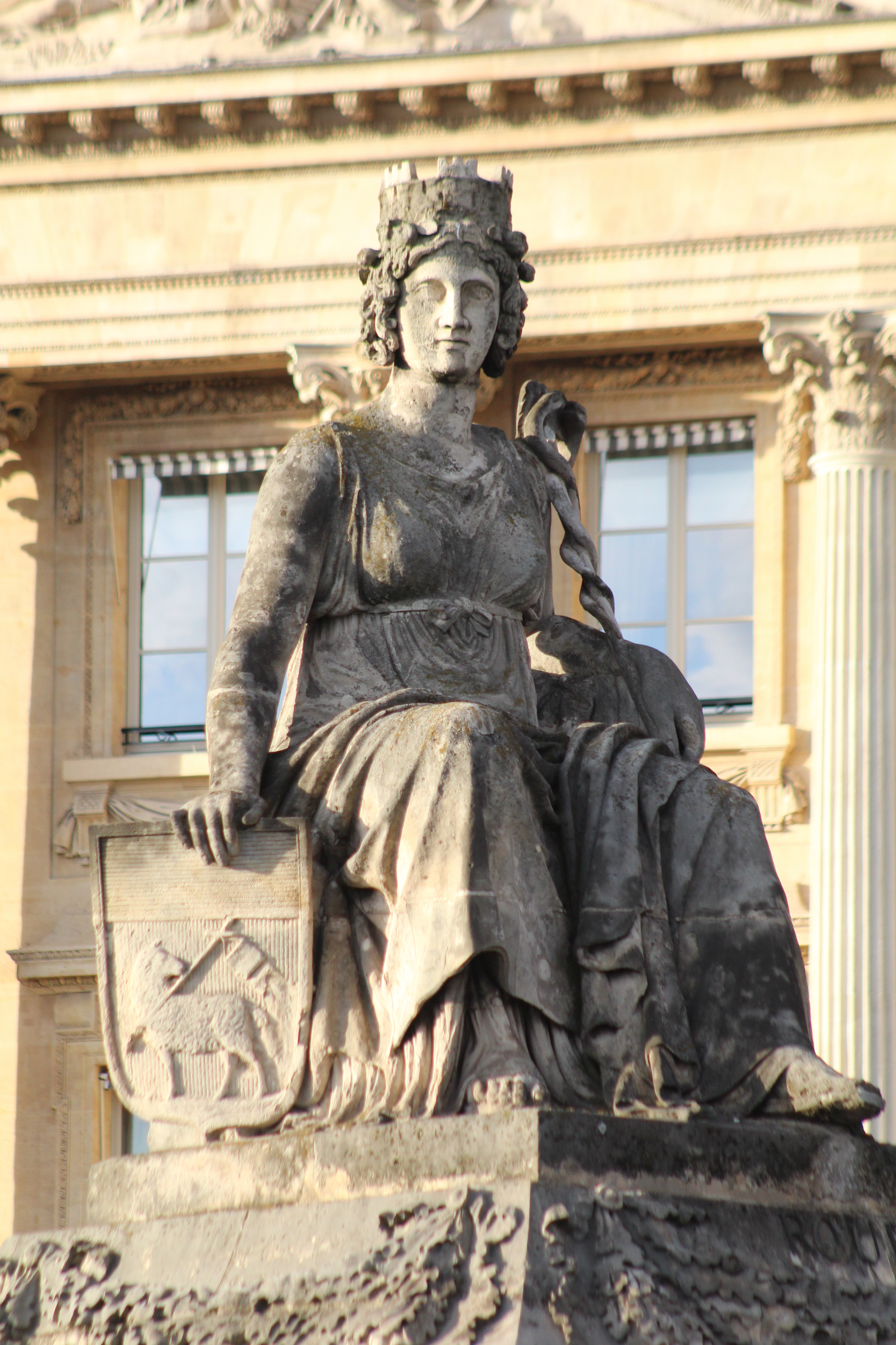 Statue de Rouen sur la place de la Concorde à Paris.